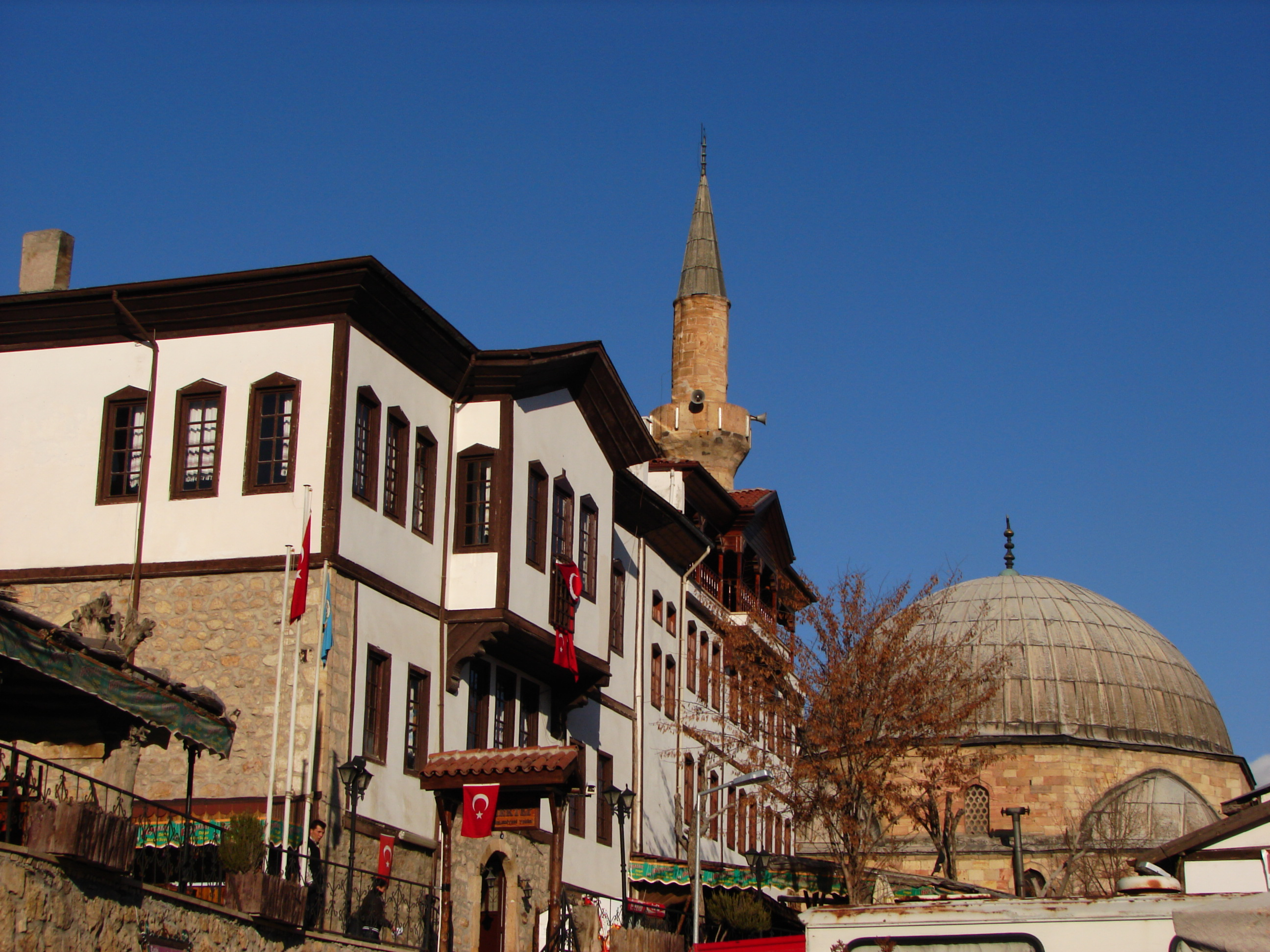 Beypazari Taşmektep